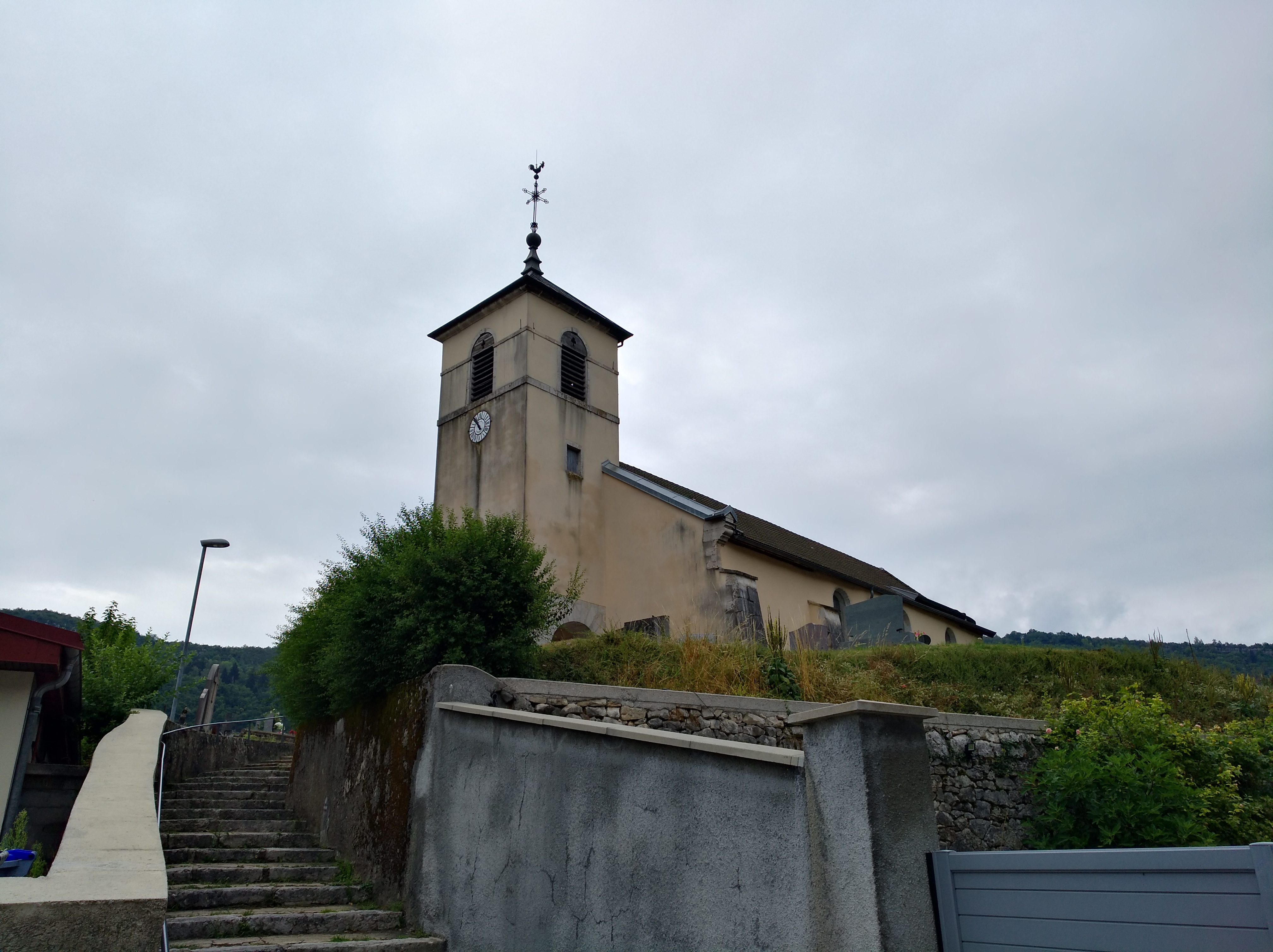 Église Saint-Léger de Molinges (Jura, France).